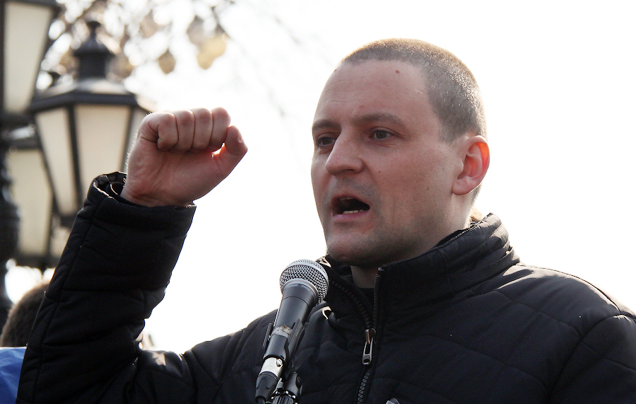 Сергей Удальцов на митинге Ткачи на Пушке, 2011